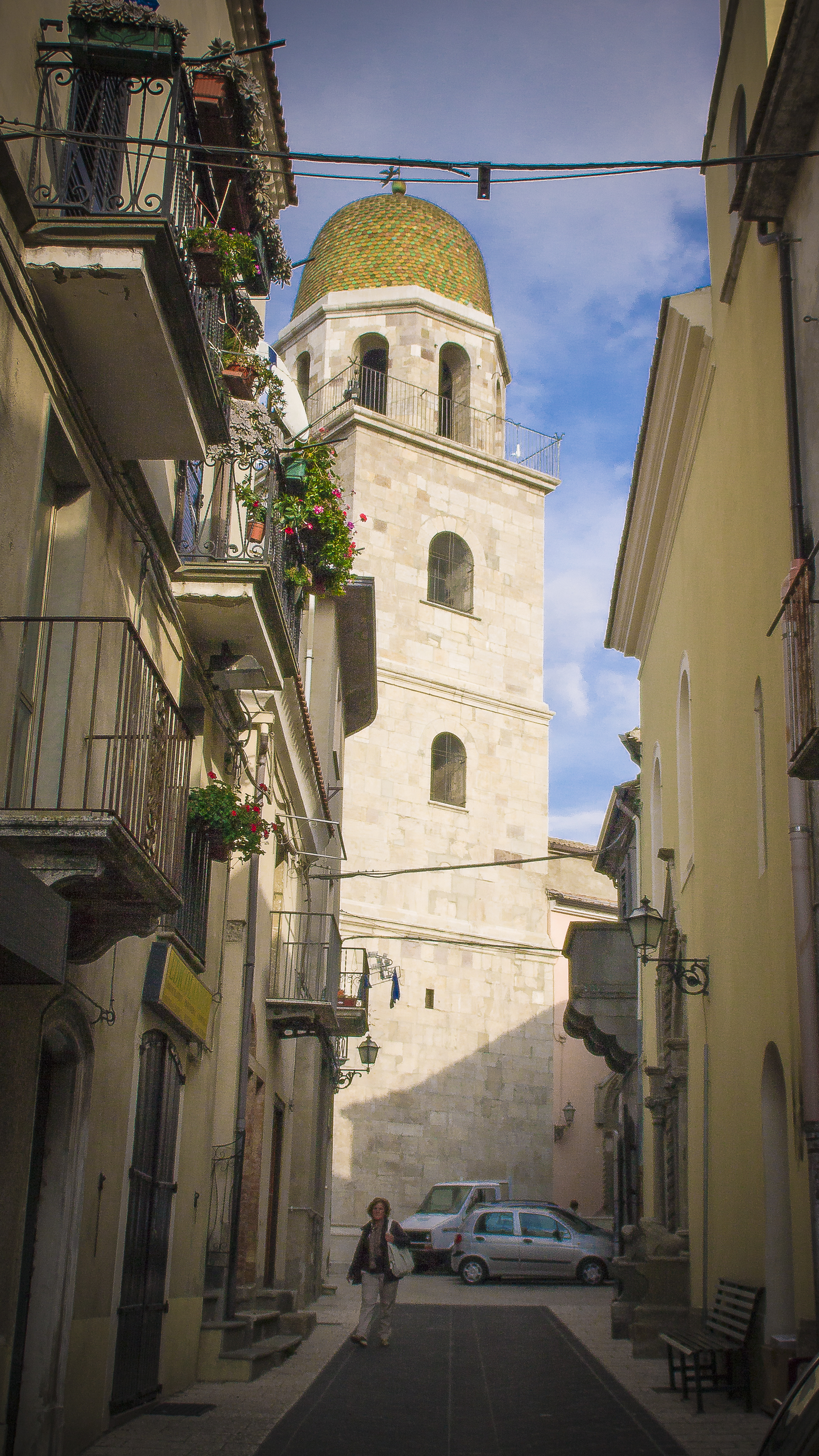 Chiesa Madre